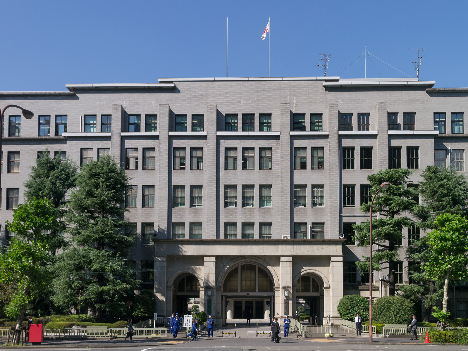 財務省、国税庁、東京都生千代田区霞が関3-1-1。